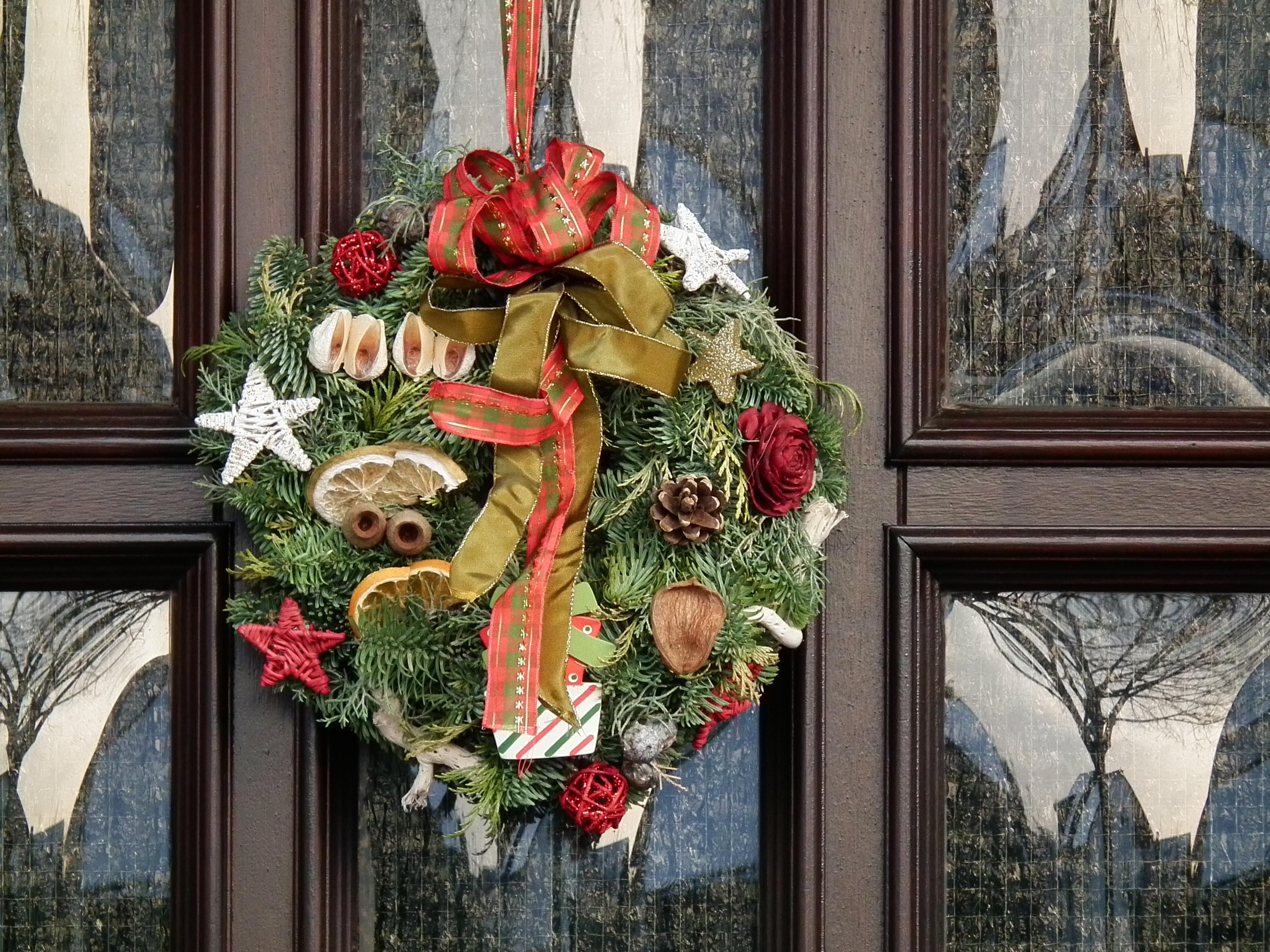 Kranz als adventlichen Schmuck einer Haustür